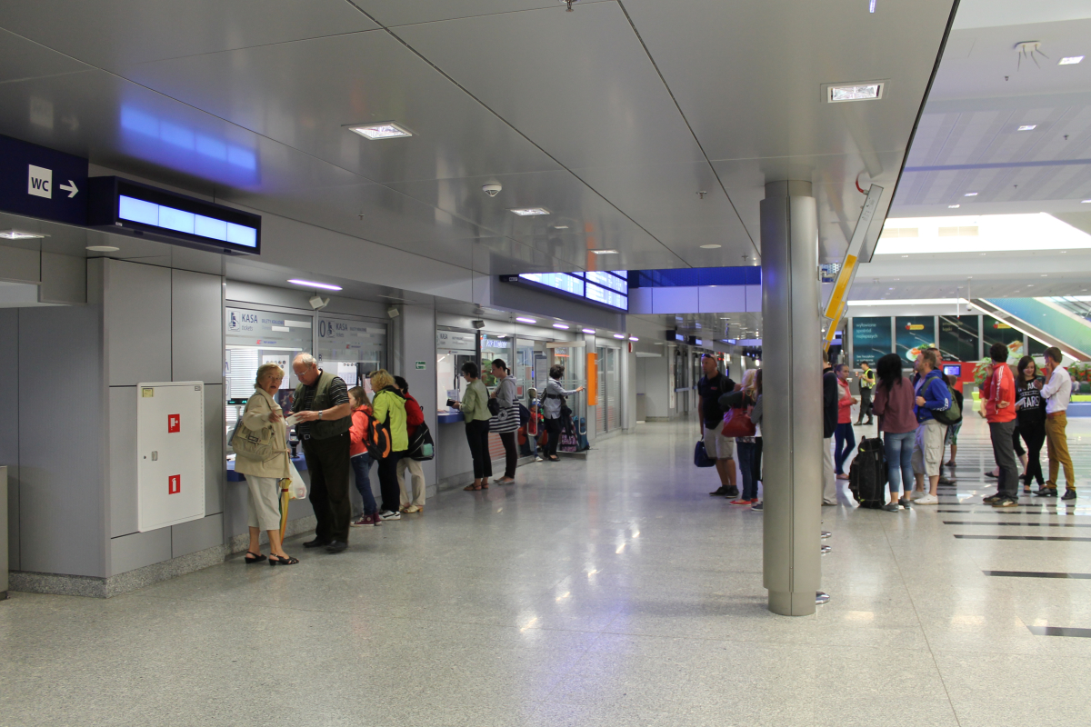 Kasy biletowe na dworcu głównym w Krakowie. This photo was taken during Railway Wikiexpedition 2014 set up by Wikimedia Polska Association in cooperation with Fundacja Grupy PKP. You can see all photographs in category Wikiekspedycja kolejowa 2014.